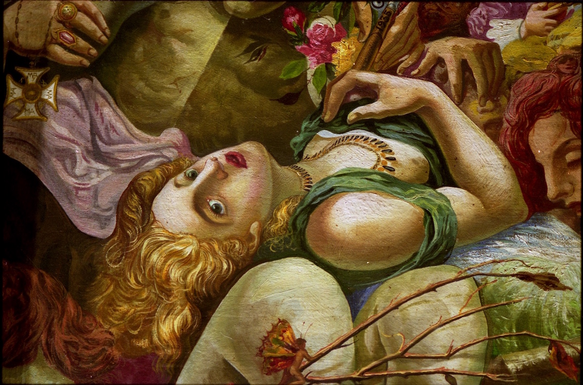 Affresco